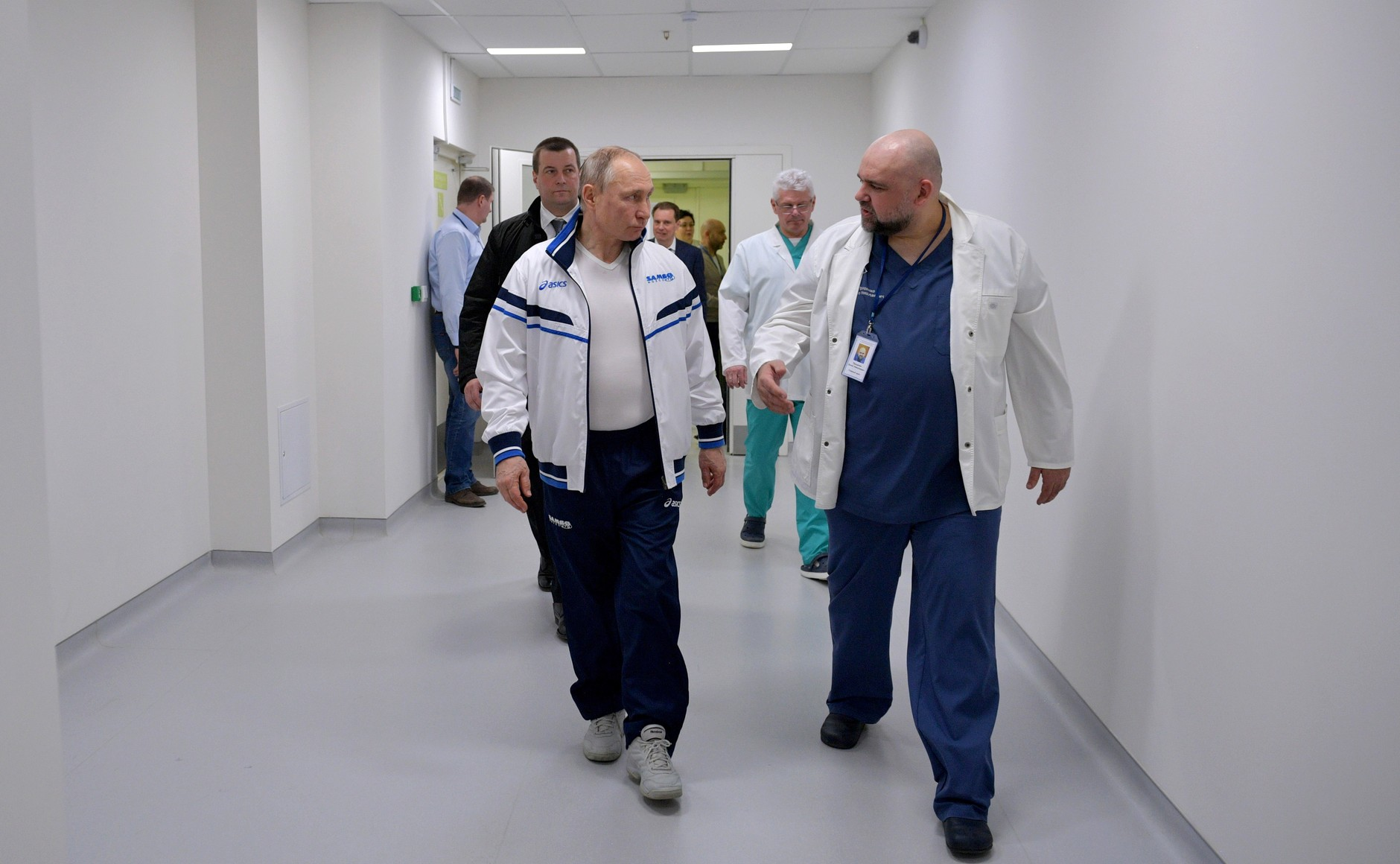 Владимир Путин осмотрел в московском посёлке Коммунарка больницу, предназначенную для пациентов с подозрением на коронавирусную инфекцию. В ходе осмотра больницы в московском посёлке Коммунарка, предназначенной для пациентов с подозрением на коронавирус. С главврачом ГКБ №40 Денисом Проценко.